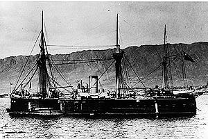 Fragata Blindada Blanco Encalada (1º).